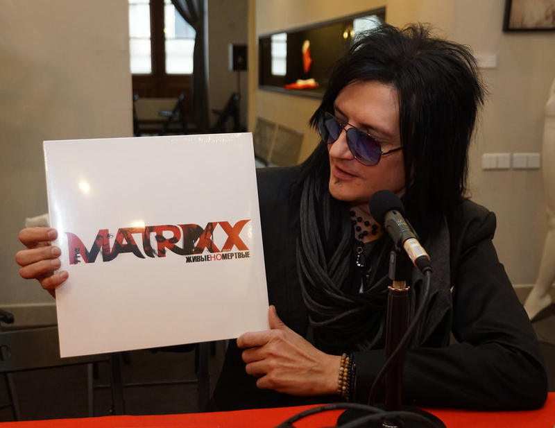 Дмитрий Хакимов (группа The Matrixx)